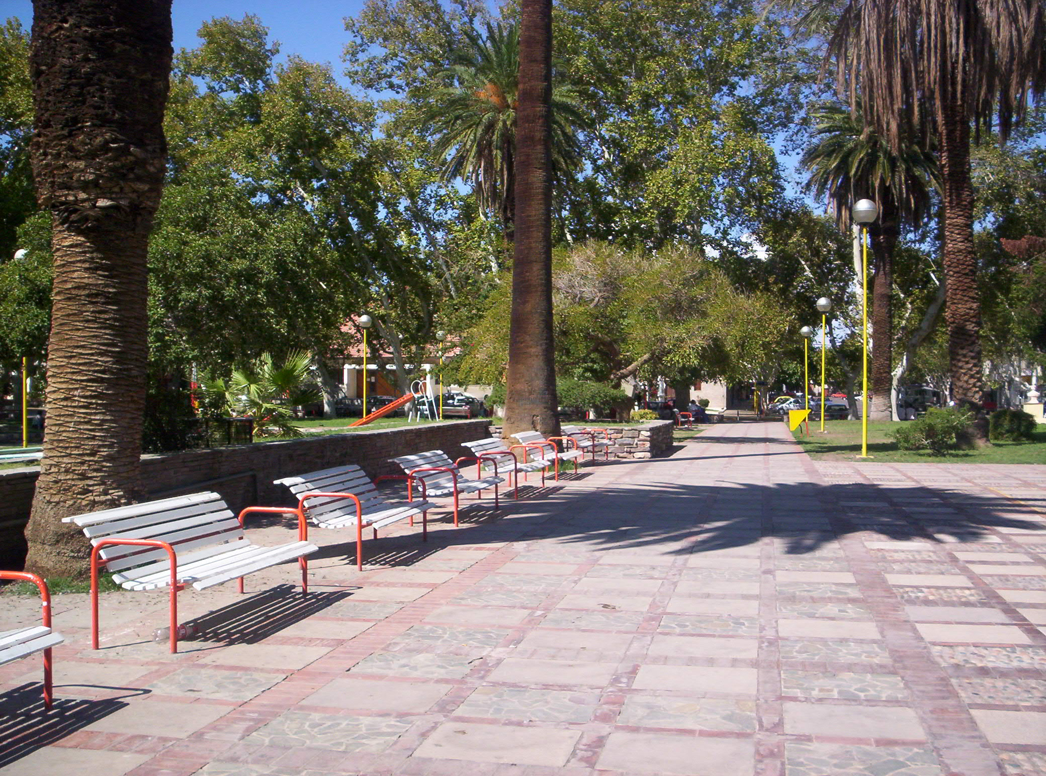 Vista de una de las plazas céntricas de la ciudad argentina San Juan, siendo la misma la plaza Aberastain